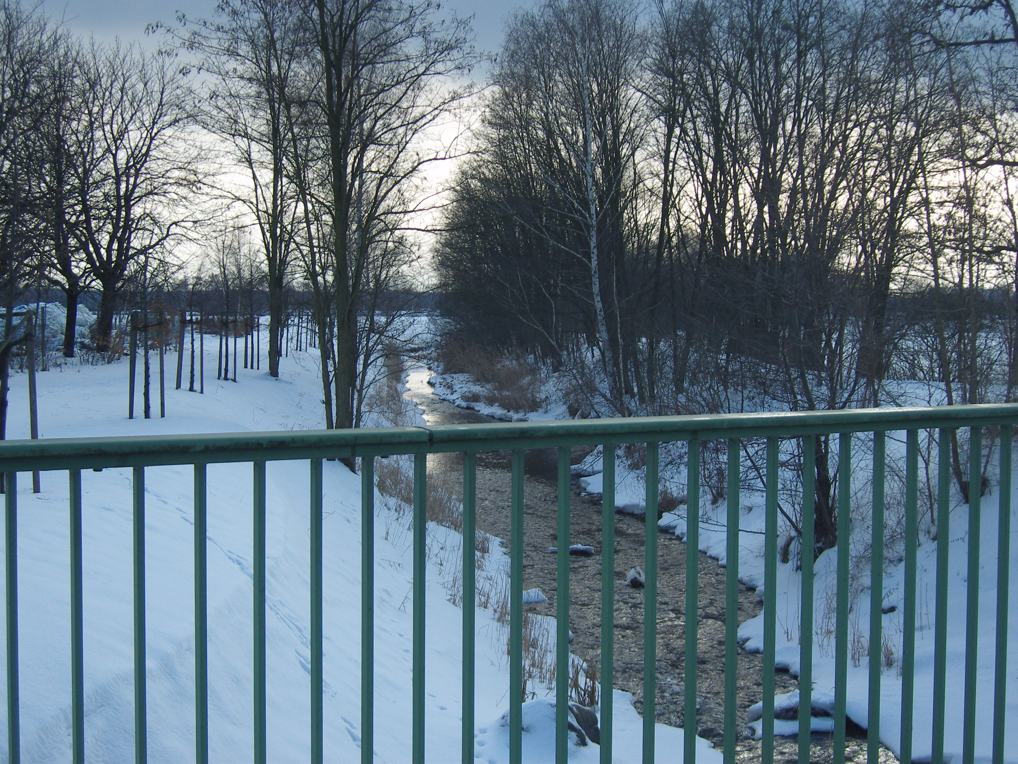 Die Pößnitz, rechter Nebenfluss der Schwarzen Elster, in Schwarzheide